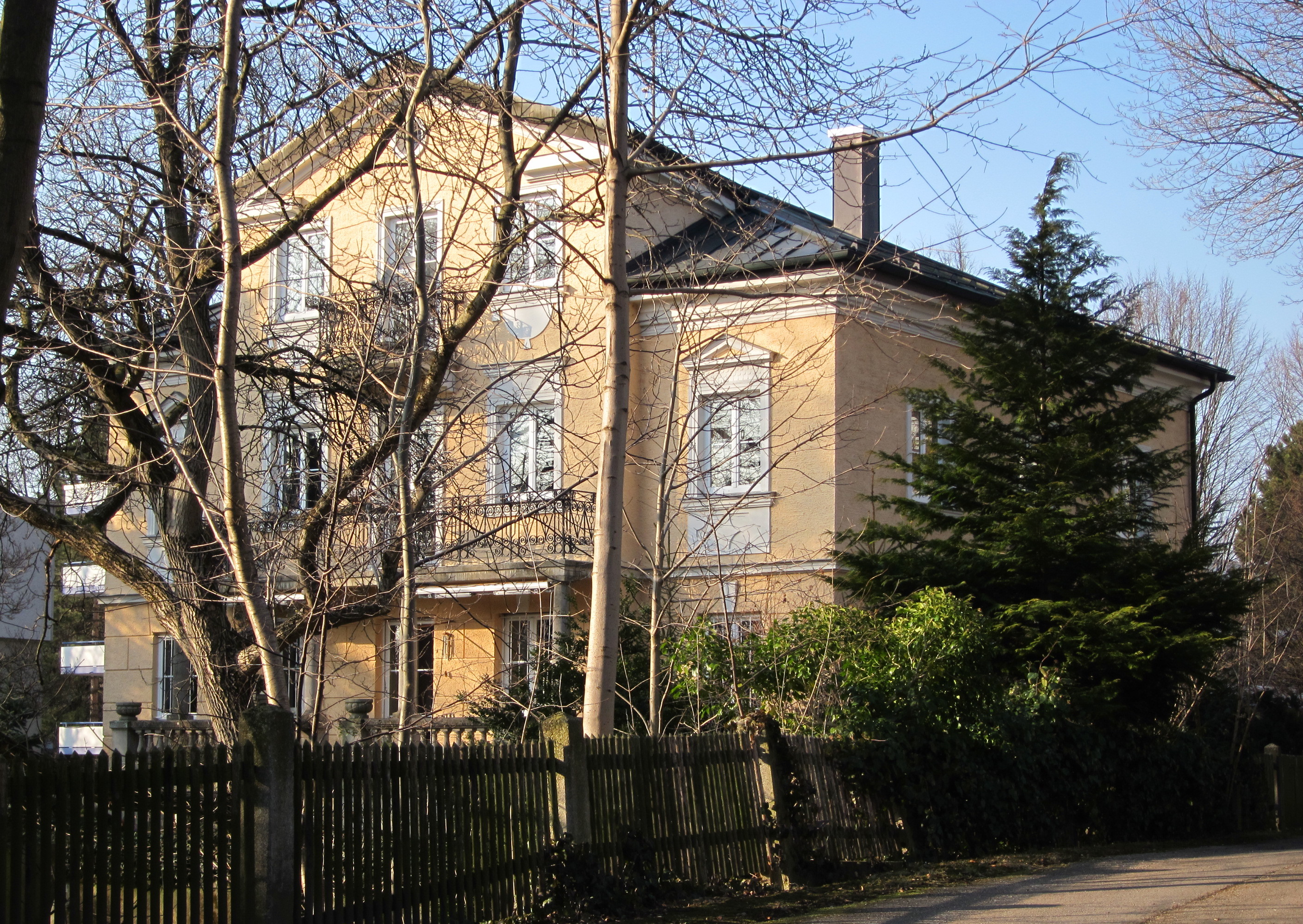 Englschalkinger Straße 229; Villa, historisierend, 1. Viertel 20. Jh.; städtebaulicher Akzent am Rand des modernen Wohnviertels